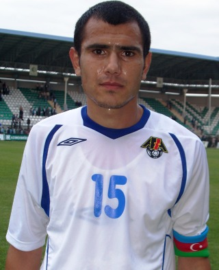 футболист Нодар Мамедов (Азербайджан)